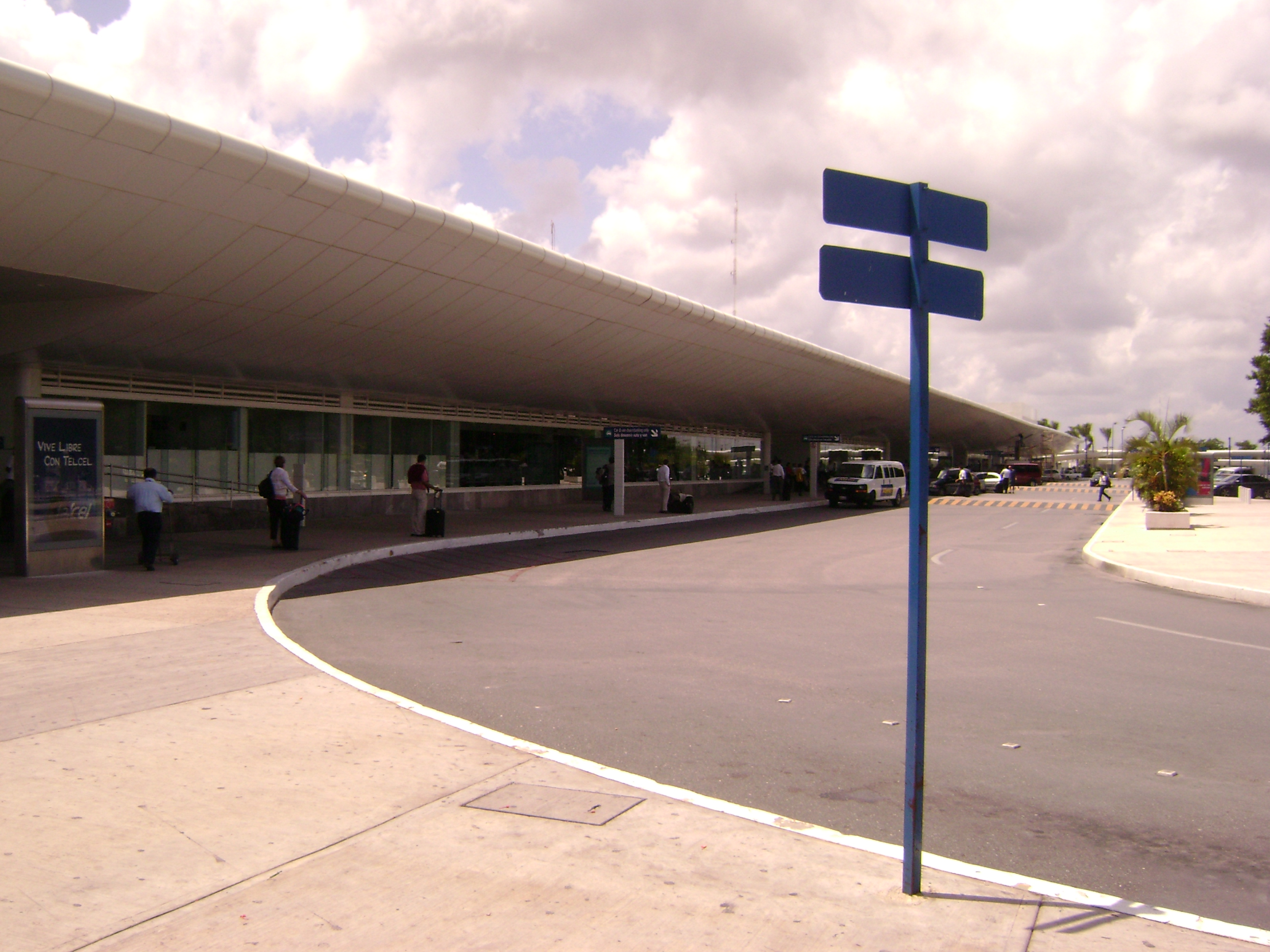 exterior del Aeropuerto Internacional de Cancún, Quintana Roo.